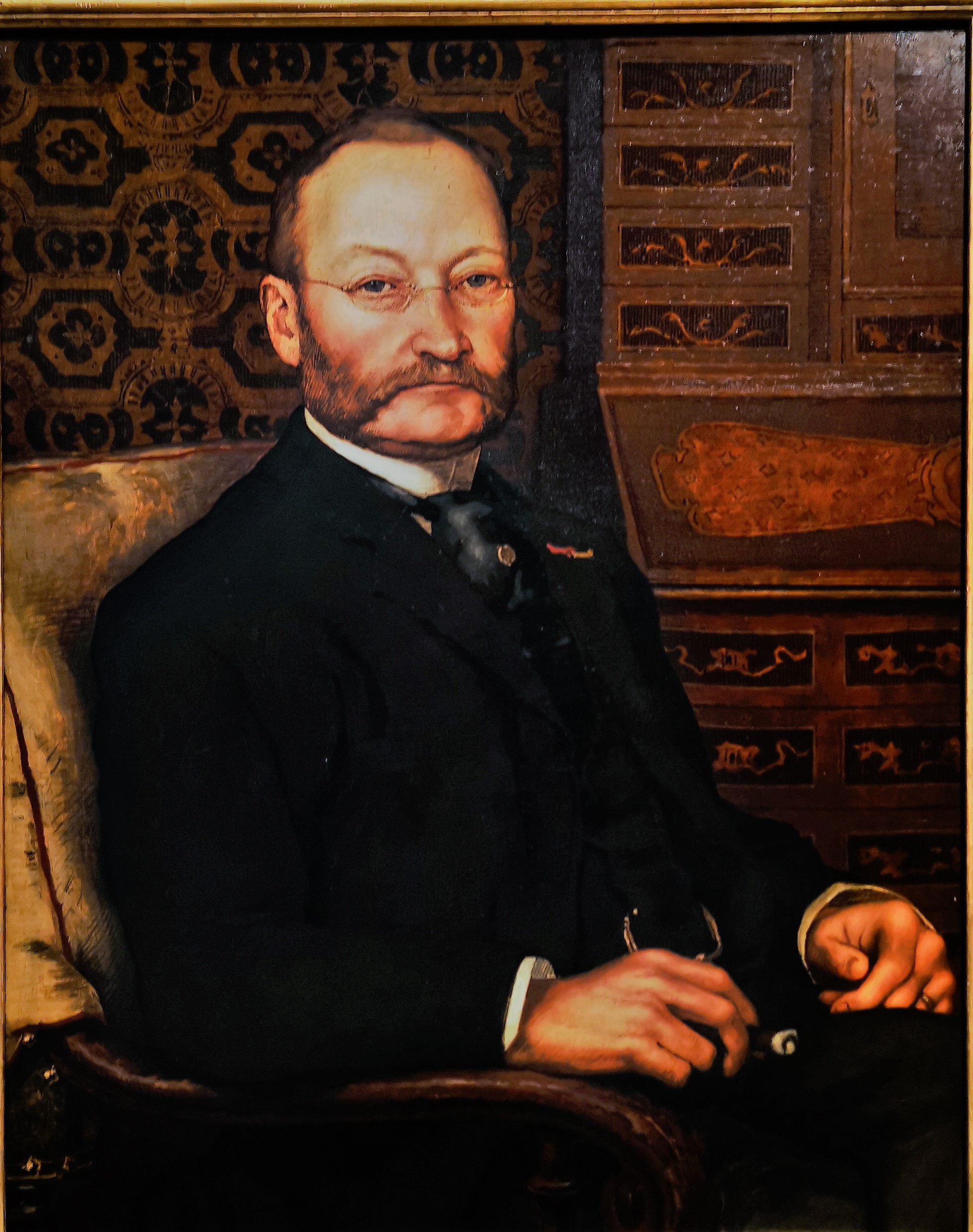 Carl Freiherr von Pidoll zu Quintenbach, portrait de Léon Würth. Huile sur carton. 2 moitié du 19e siècle.